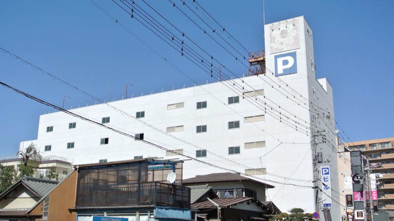 クッキープラザ裏の駐車場ビルです。